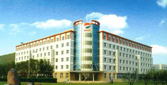 北京になる王振国医師の病院－振国中西医結合腫瘍病院